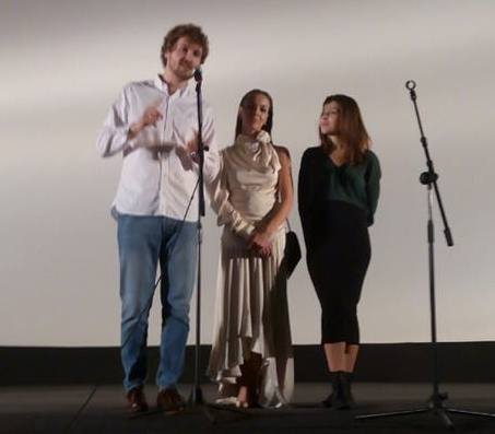 Кинотеатр им. Довженко - Запорожье